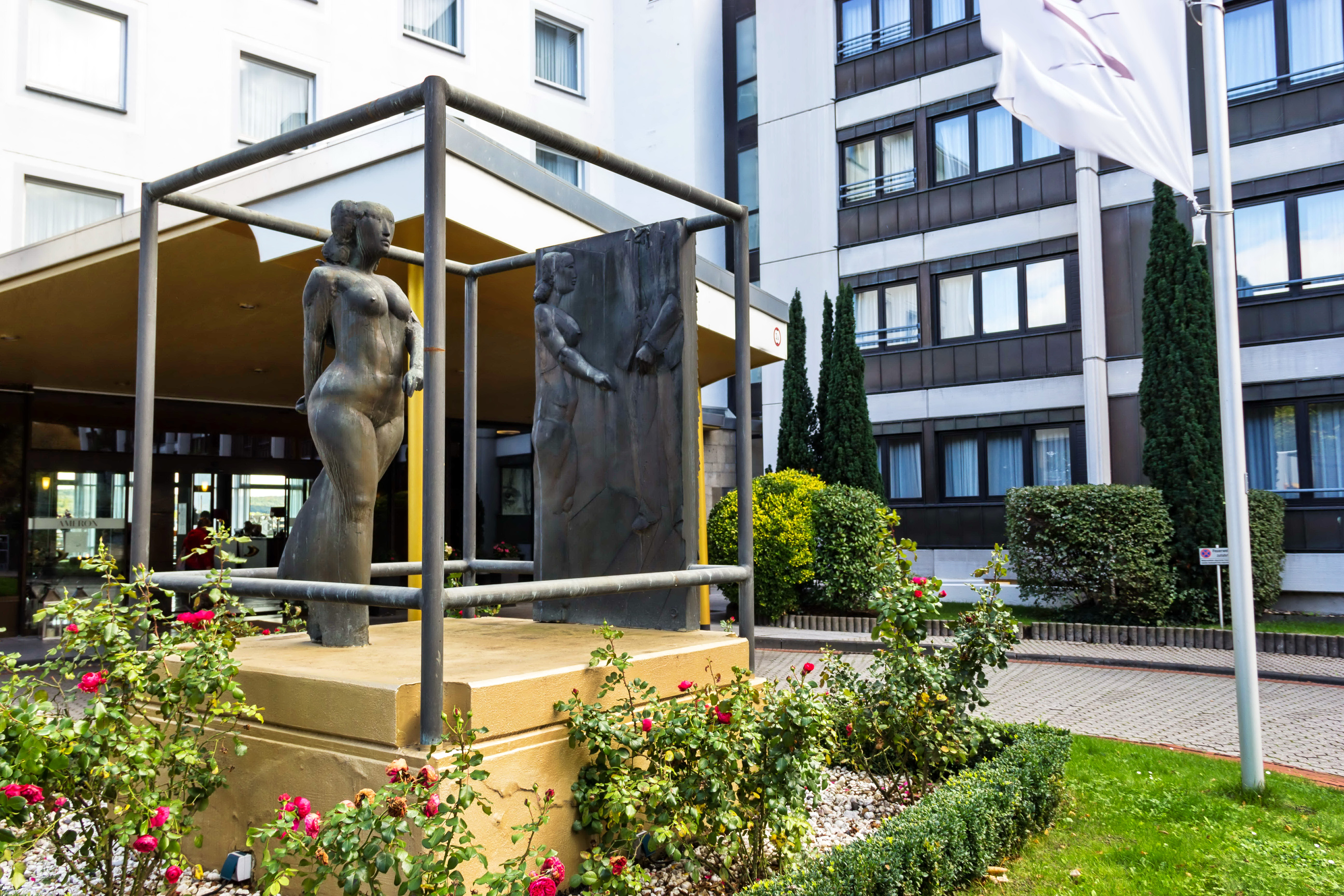 Gäste im Hotel (Begegnung); Die Skulptur von Richard Heß befindet sich vor dem Eingang des Hotels Königshof an der Bonner Adenauerallee in der Südstadt. Die Skulptur aus dem Jahr 1983 erinnert an ein Hotelzimmer, in dem sich eine Frau aufhält. Die Figur spiegelt sich in einer Seitenwand, in der zusätzlich ein Mann zu sehen ist, und deren Rückseite als heruntergelassene Jalousie ausgeprägt ist, wieder.